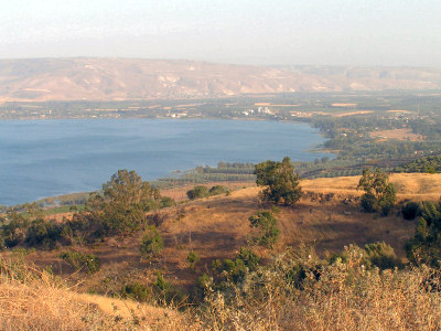 ee Genezareth (Yam Kinneret), Israel. Blick auf den See vom sgn Schweizer Wald.